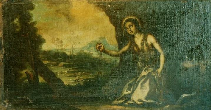 La obra representa a Santa María Magdalena haciendo penitencia por sus pecados.